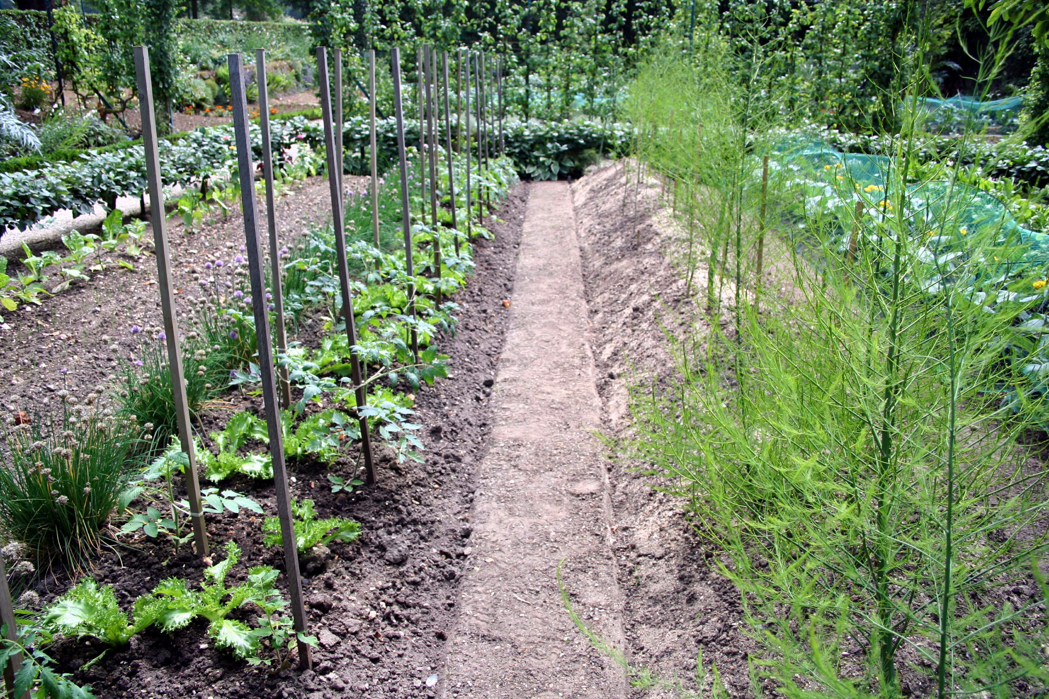 Jardin potager de Bagatelle - Paris (France)